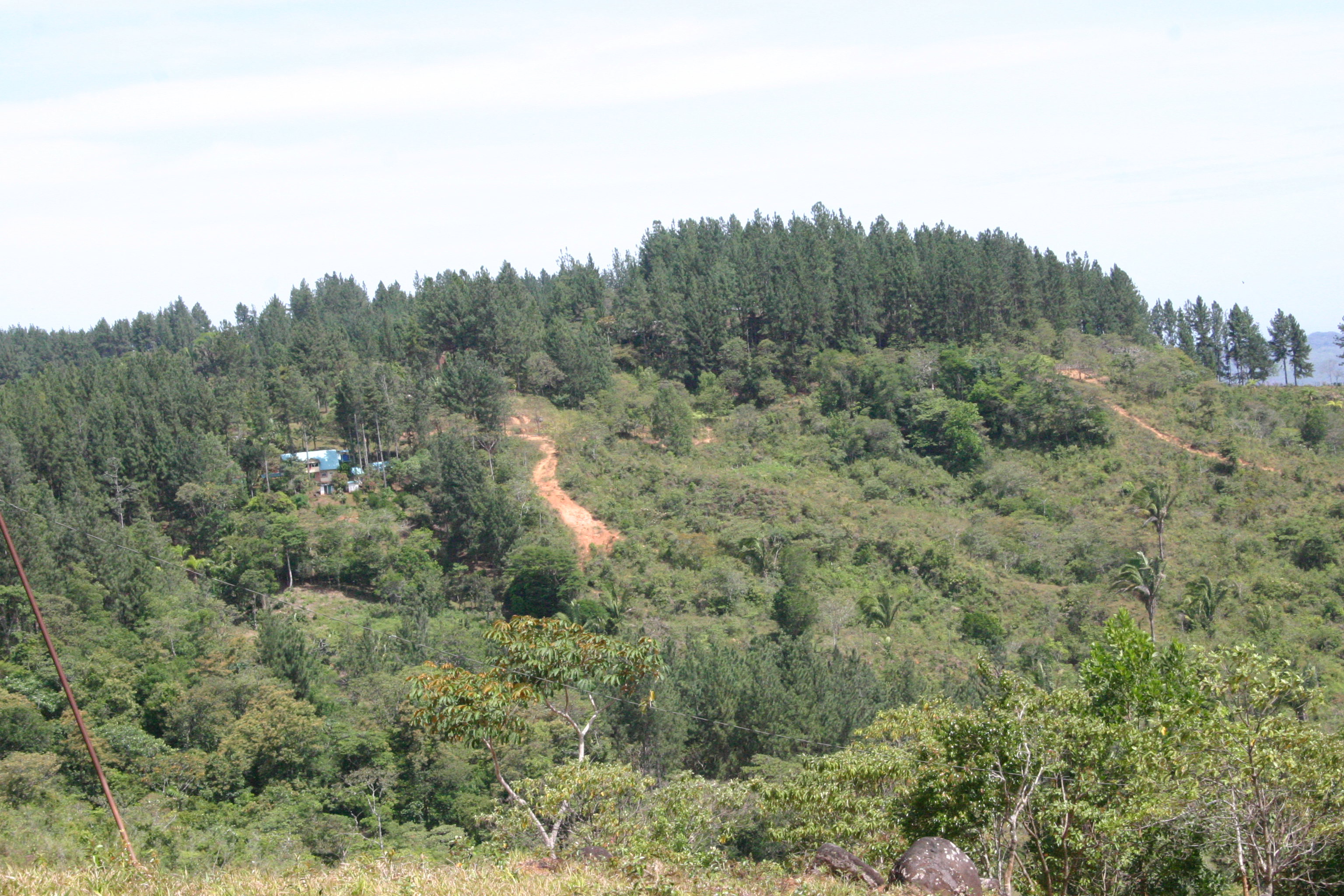 Bosques en el valle de Pesé, provincia de Herrera